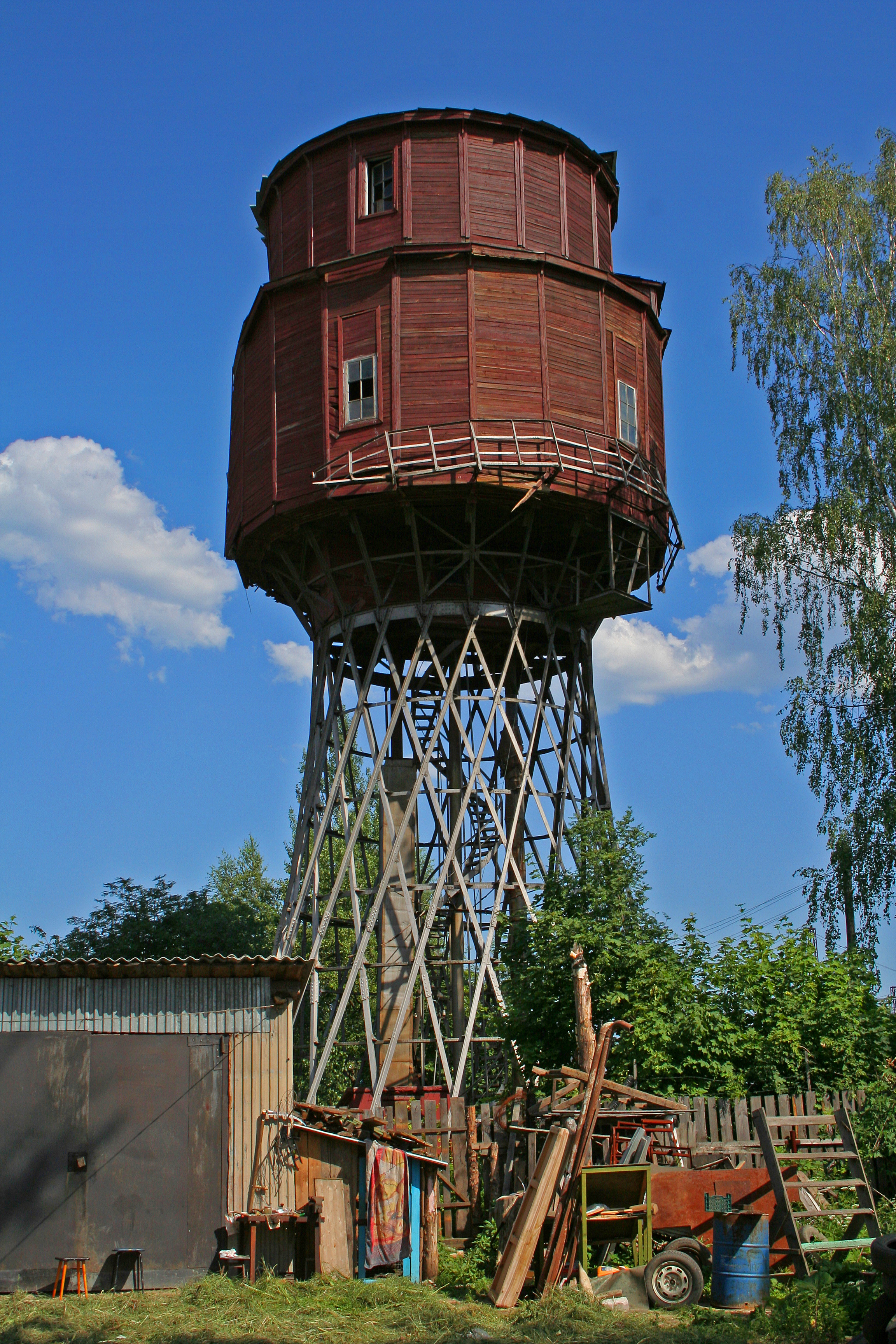 Wasserturm in Petuschki, Oblast Wladimir, Russland.